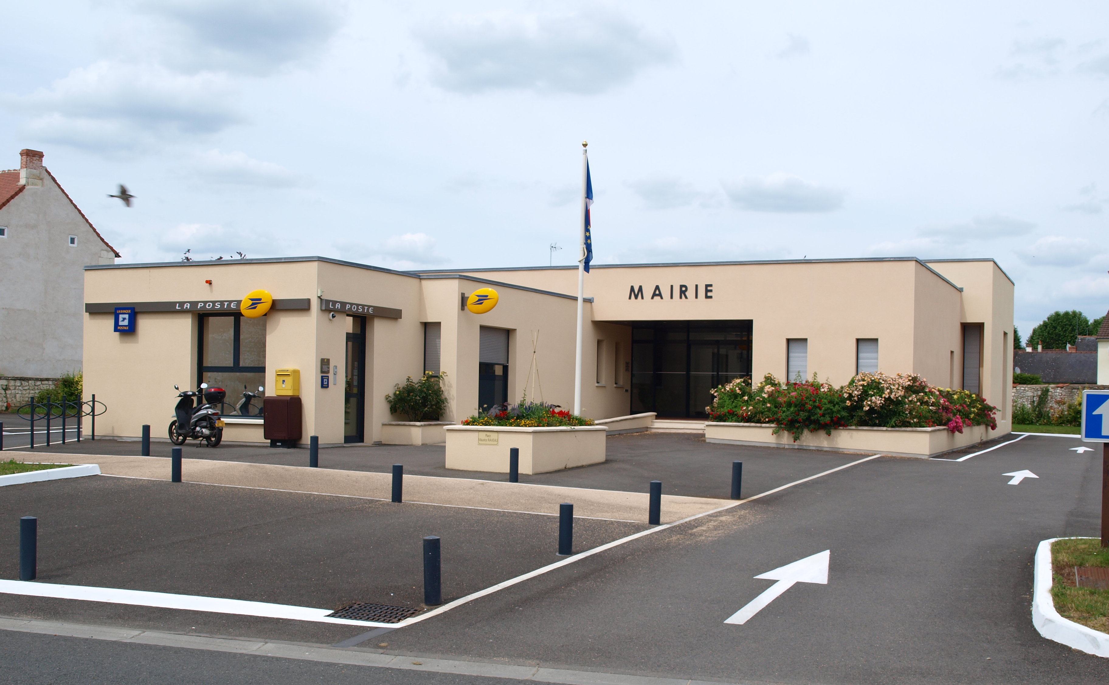 Pouzay (Indre-et-Loire, France) ; mairie.